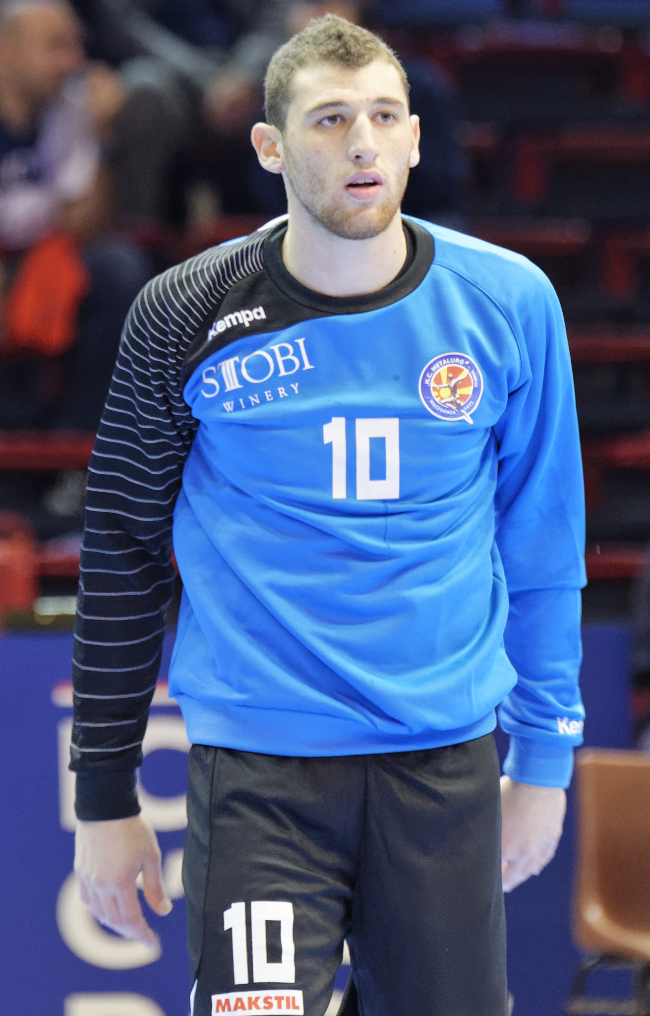 Rencontre de ligue des champions 2014-15 entre le PSG et Metalurg. A la Halle Carpentier (Paris), le 30 novembre 2014.